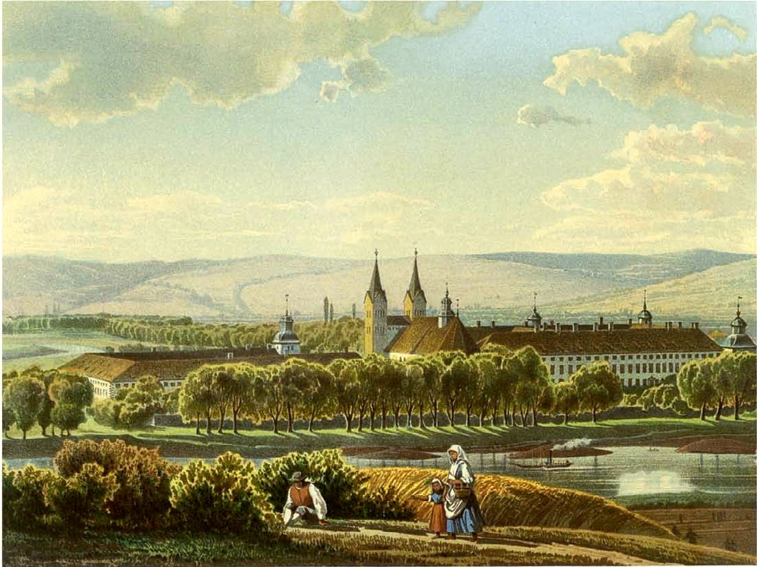 Schloss Corvey